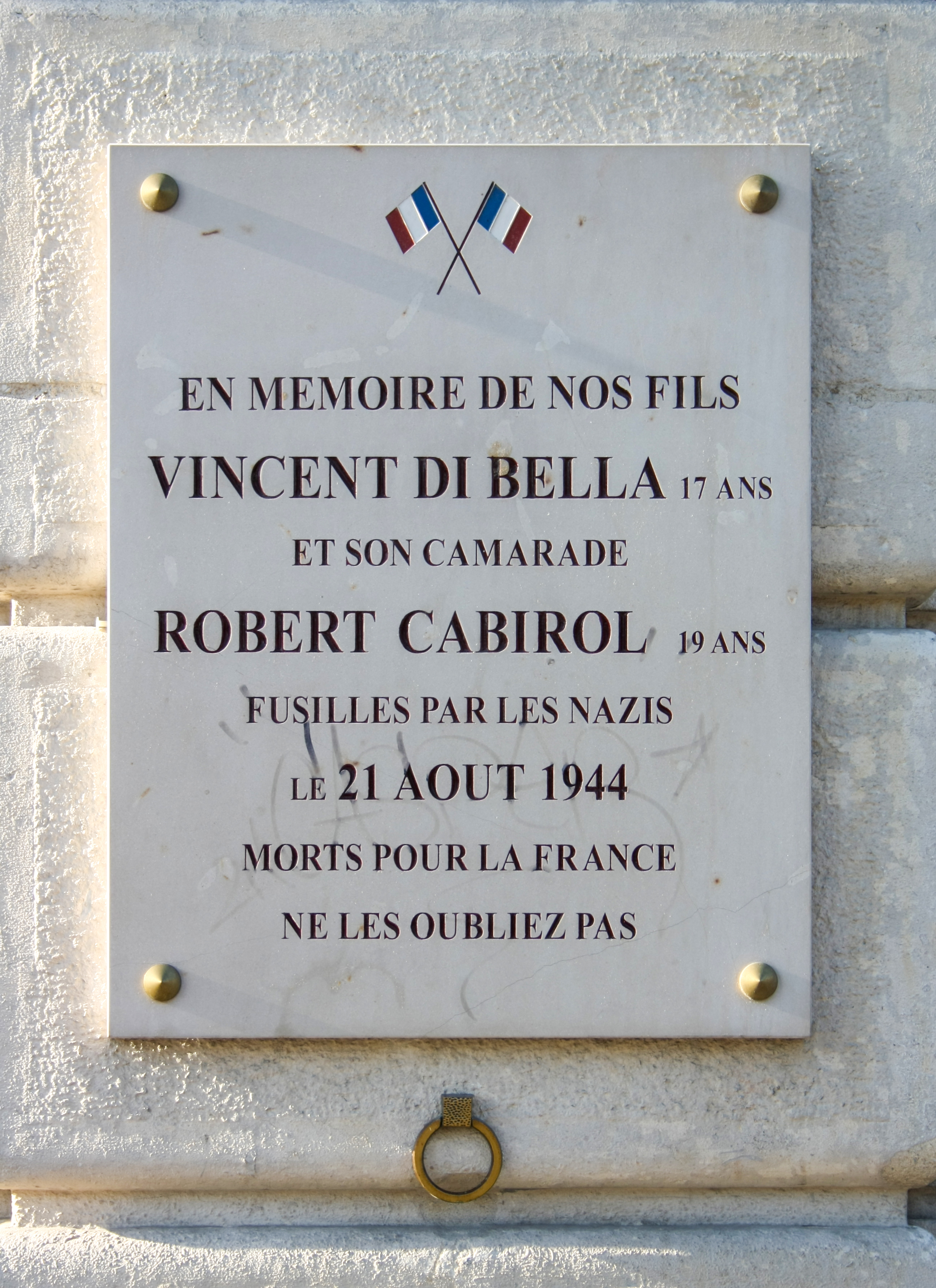 Gedenktafel für Vincent di Bella und Robert Cabirol in Paris (Rue Ambroise Paré), die am 21. August 1944 von den deutschen Besatzern erschossen wurden